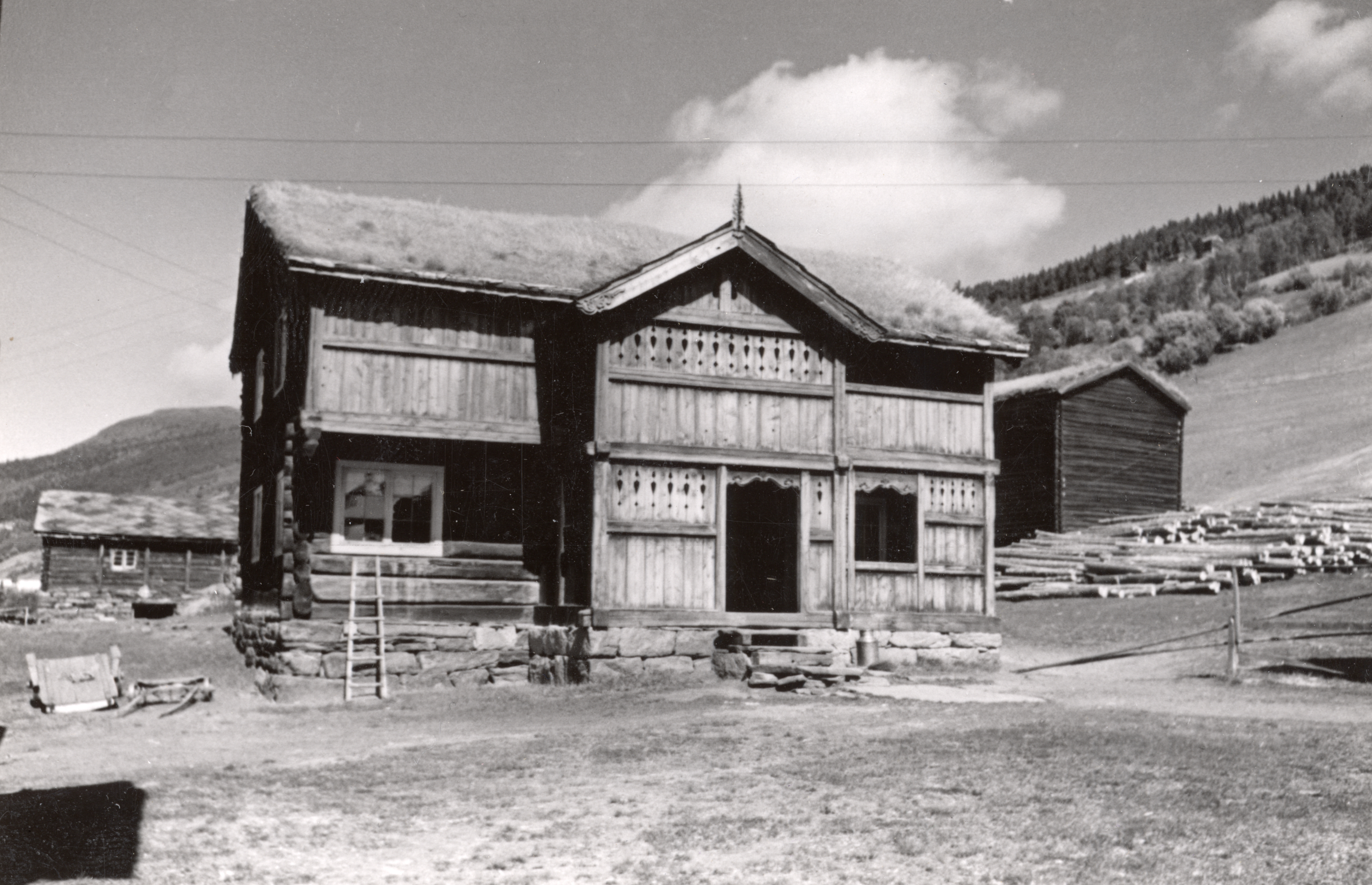 Hæringstad, Heringstad i Heidal, Oppland Stuen som er flyttet fra Steinfinsbø.